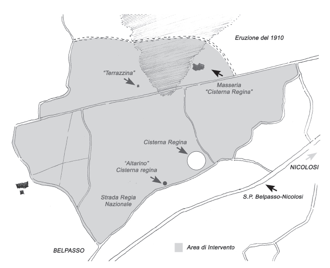 Cartina Cisterna Regina - Autore e fonte utente lupudilaguardia che la concede al pubblico dominio.